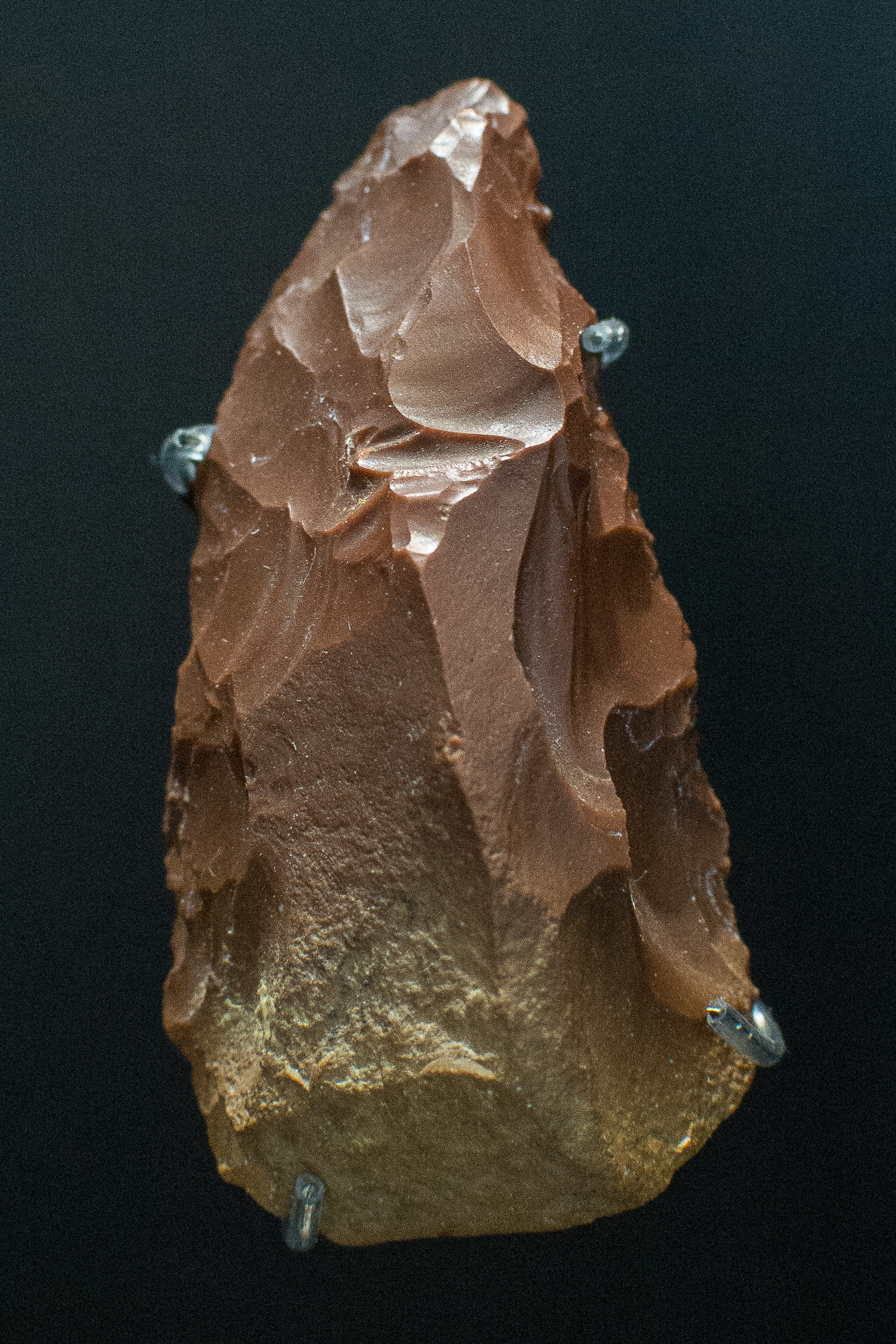 Handspitze aus braunem Jaspis, Heidenschmiede in Heidenheim an der Brenz, Grabung 1930.